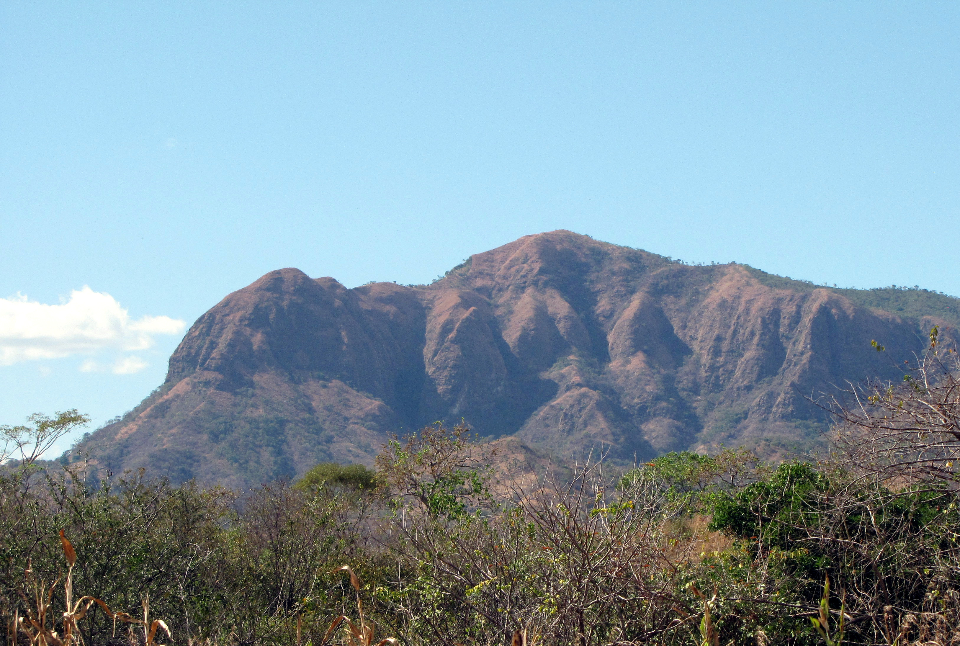 Cerro Eramon, visto desde el rio Copinolapa,Cabañas, El Salvador